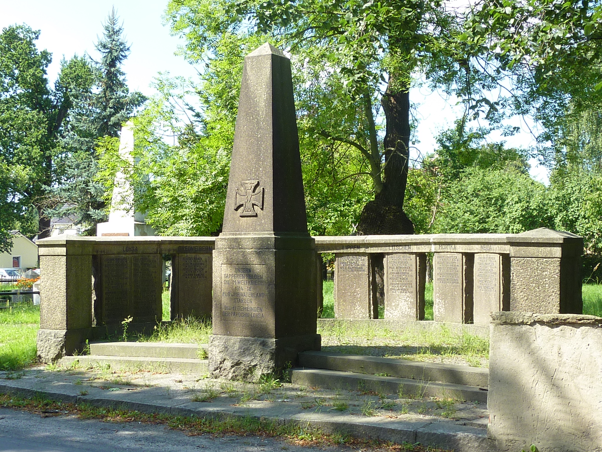 Kriegerdenkmal für die Gefallenen des Ersten Weltkriegs in Lohsa Hornjoserbsce: Pomnik padnjenym přenjeje swětoweje wójny we Łazu.